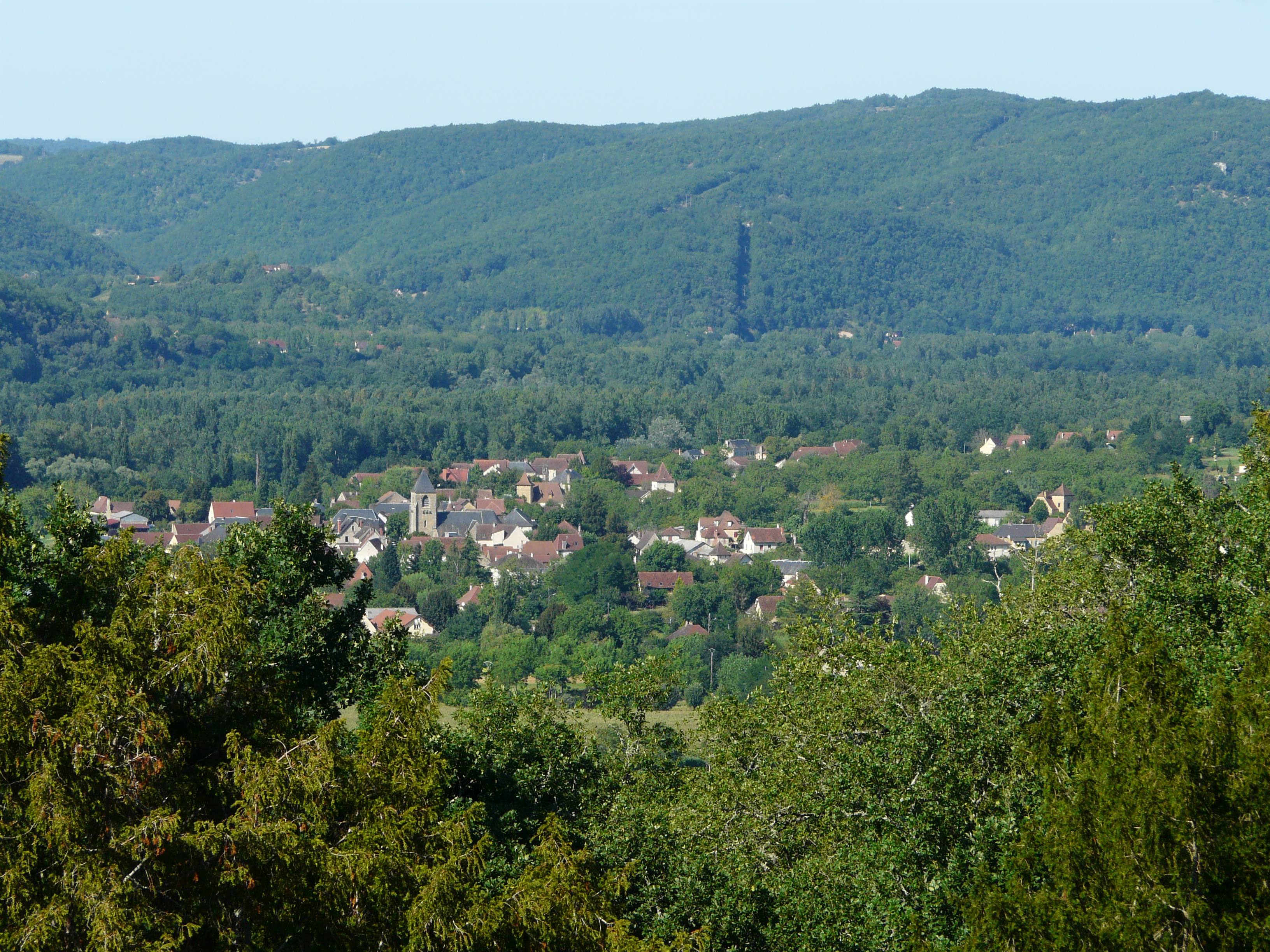 Le bourg de Saint-Julien-de-Lampon, Dordogne, France. Vue prise depuis le château de Fénelon à Sainte-Mondane. Au-delà du bourg, la vallée de la Dordogne. Au fond, à gauche la commune de Carlux et à droite, celle de Peyrillac-et-Millac.